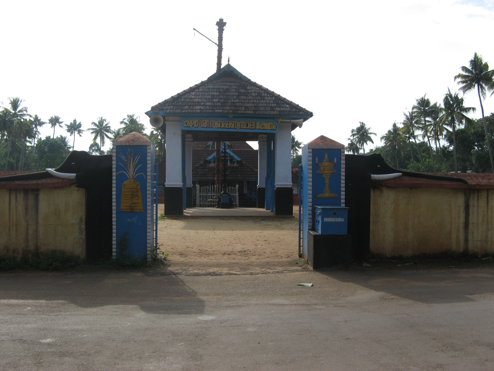 കുഴൂർ ശ്രീ സുബ്രമണ്യ സ്വാമി ക്ഷേത്രം-മുന്വാതിൽ